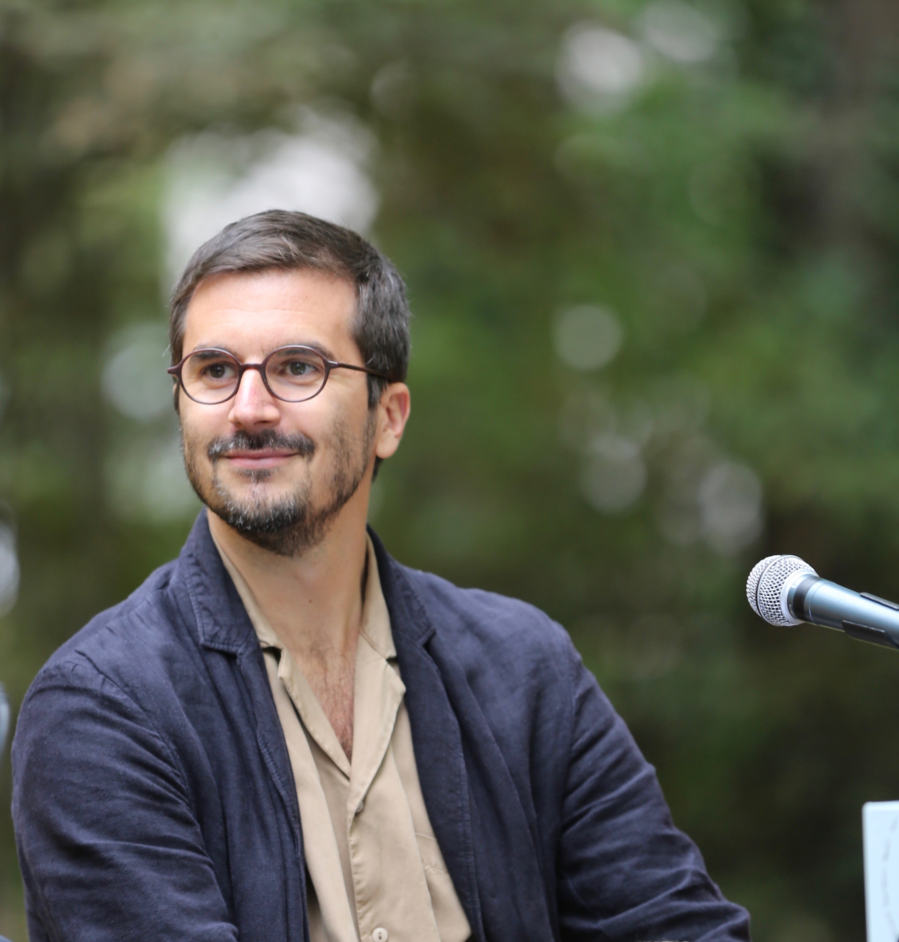 Philipp Weiss auf dem Erlanger Poetenfest 2018. Bei der Vorstellung seines Romans in 5 Bänden "Am Weltenrand sitzen die Menschen und lachen"